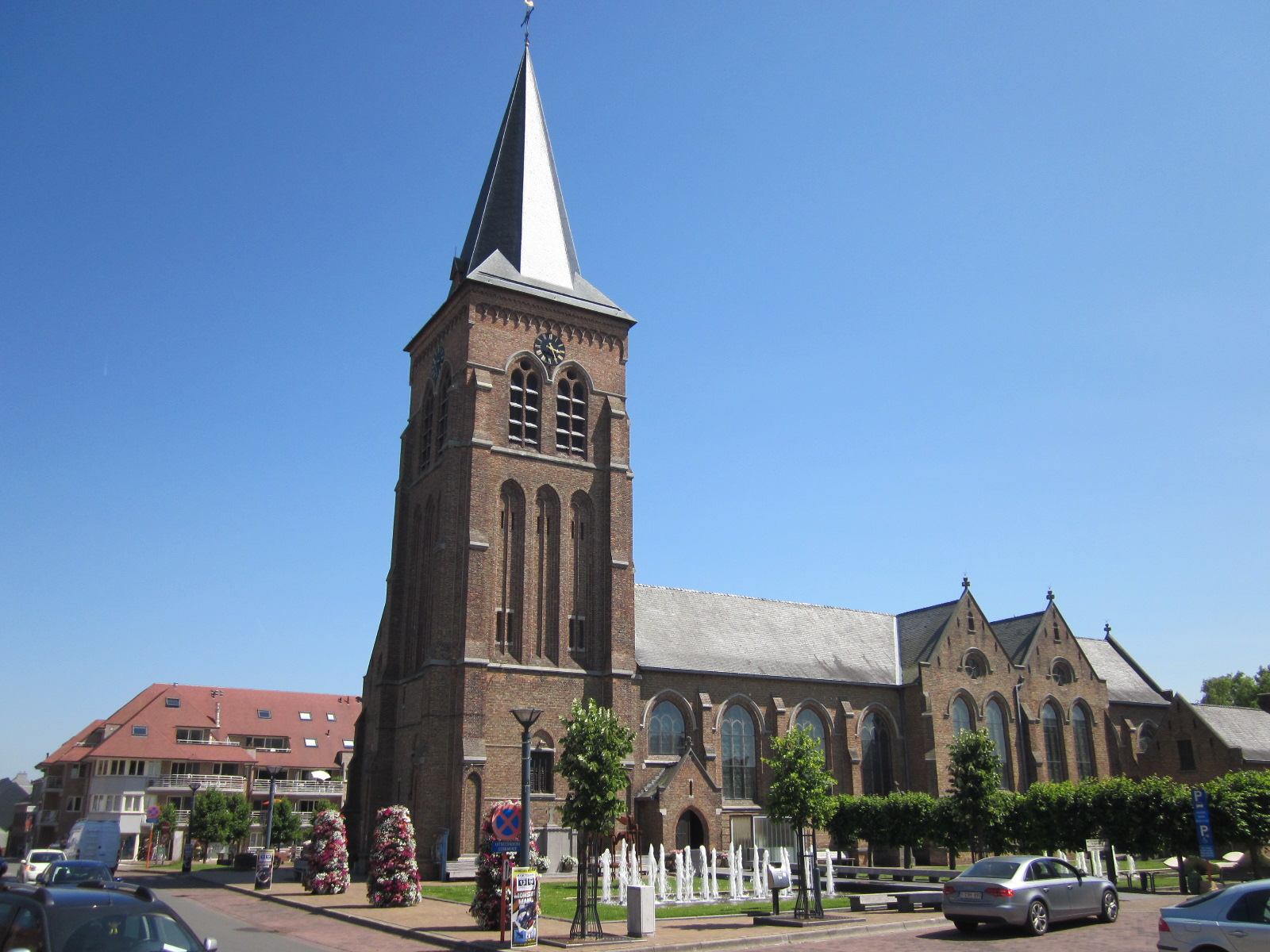 Sint-Bartholomeuskerk in Kortemark 38″ N, 3° 02′ 37.1″ E